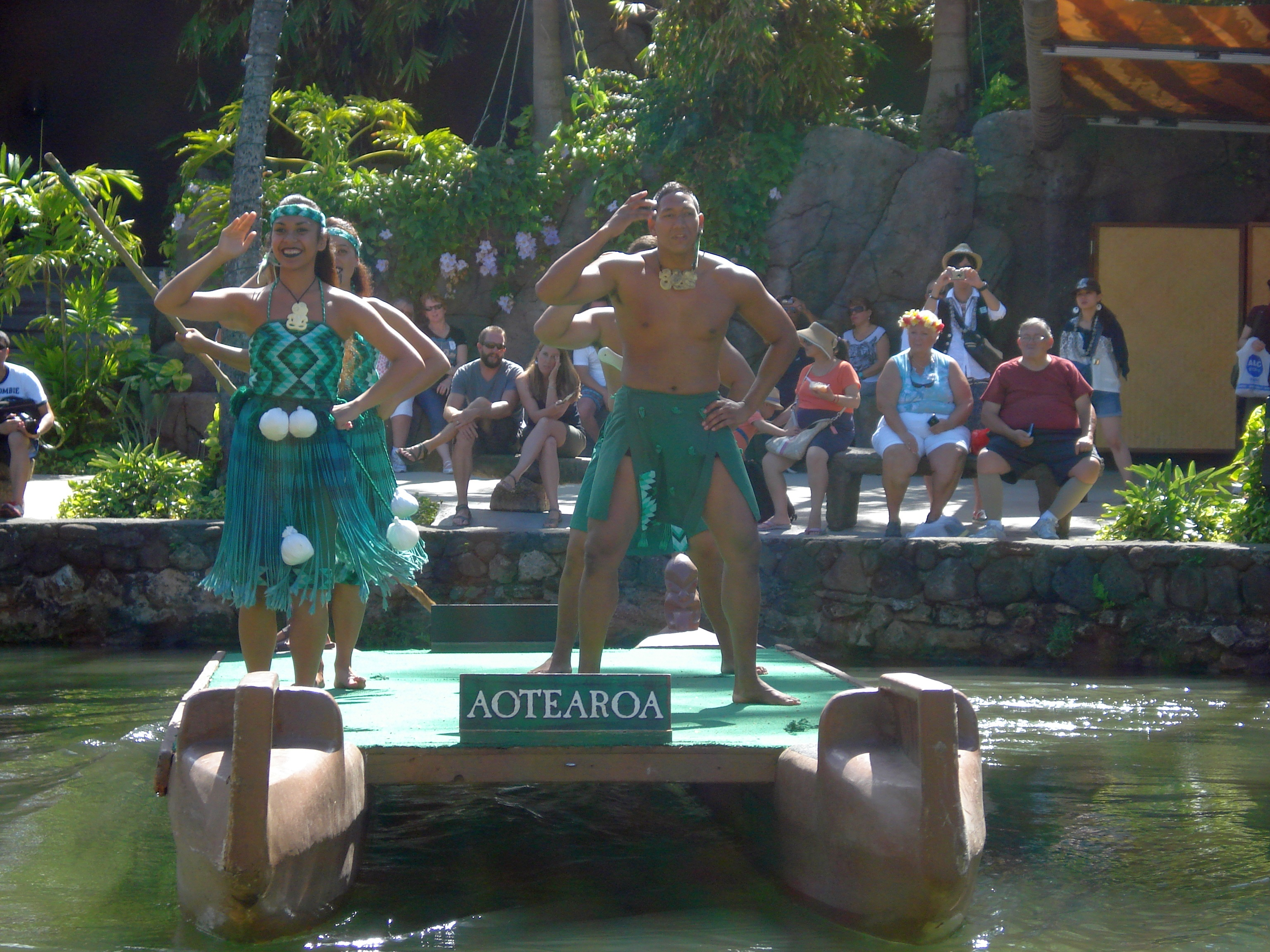 mormoński Polynesian Cultural Center; występ tancerzy z Nowej Zelandii (Aotearoa)